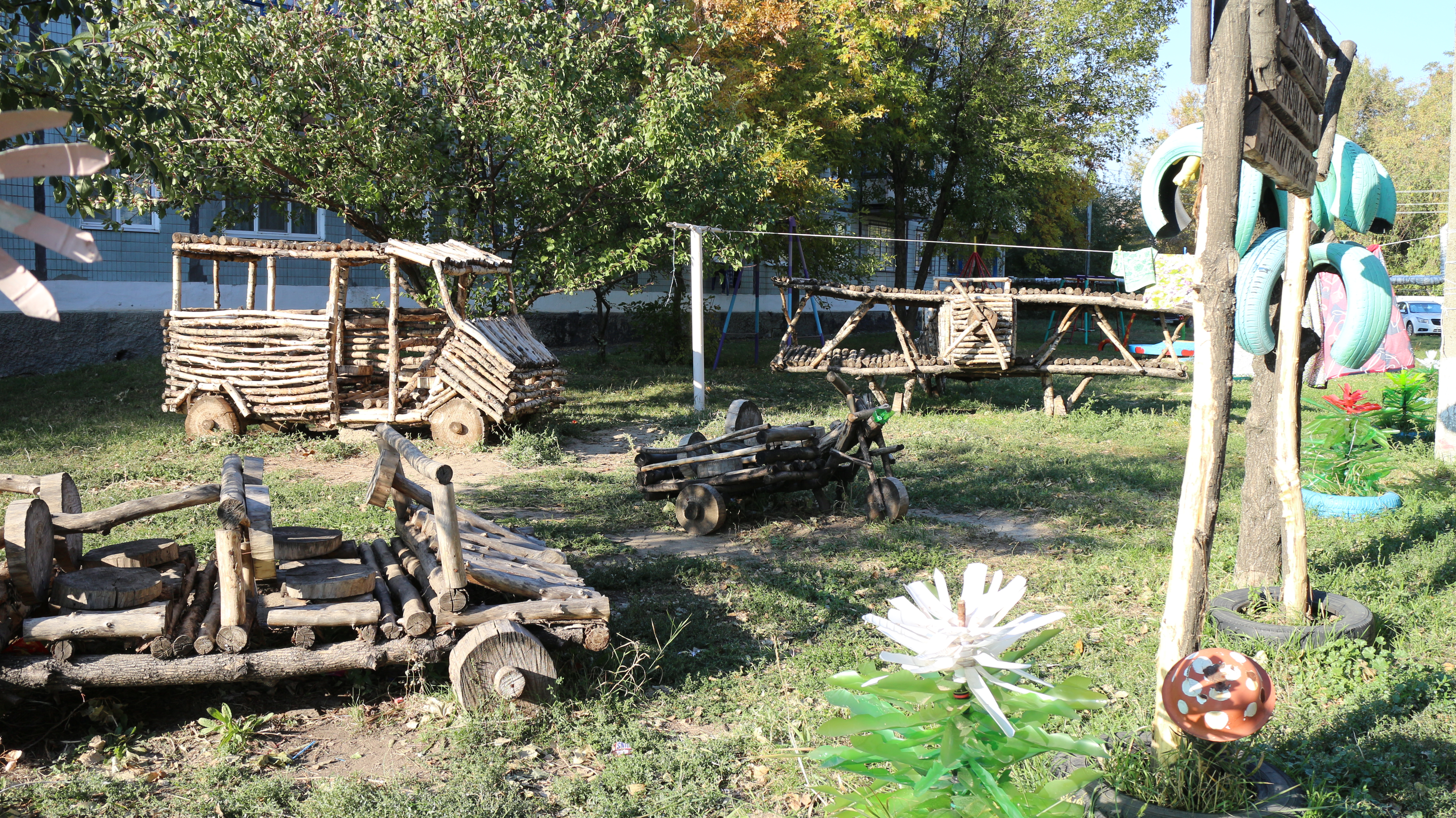 улица Герцена Гуково, Ростовская область, Россия